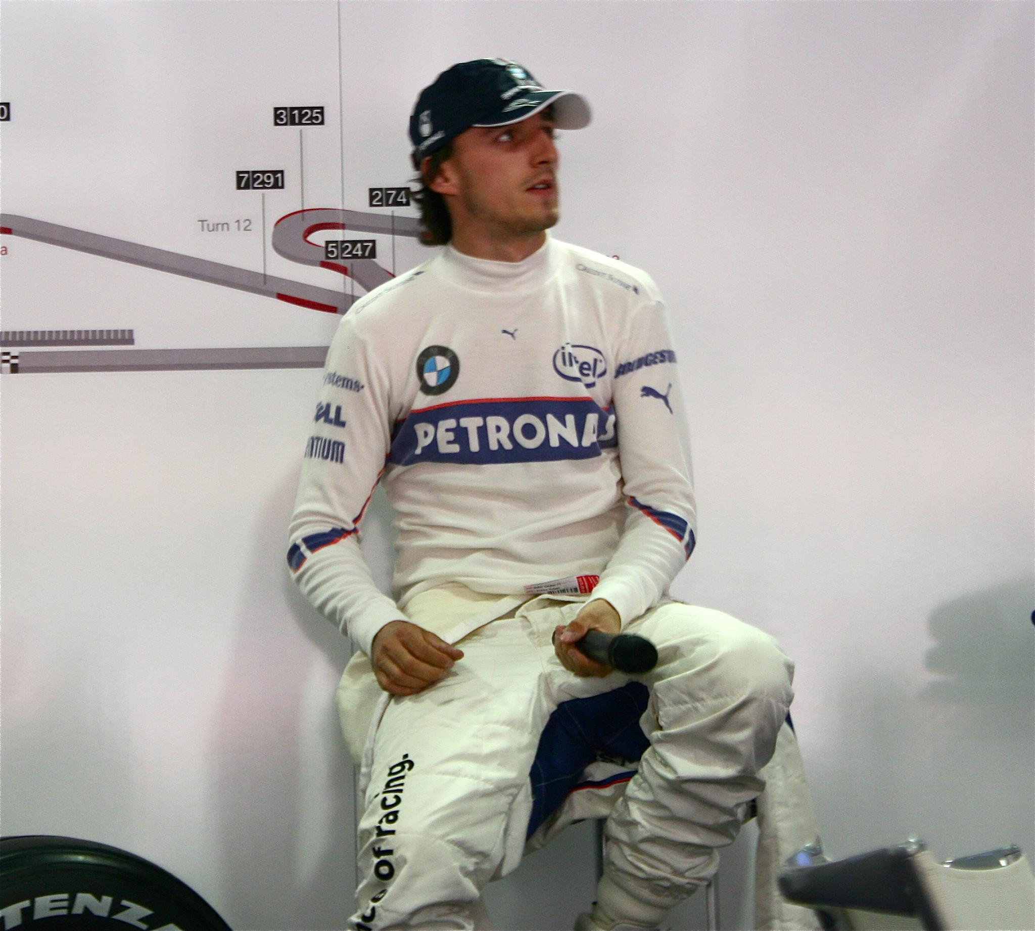 Robert Kubica en el circuito de Montmeló en Barcelona, España, en 2008.